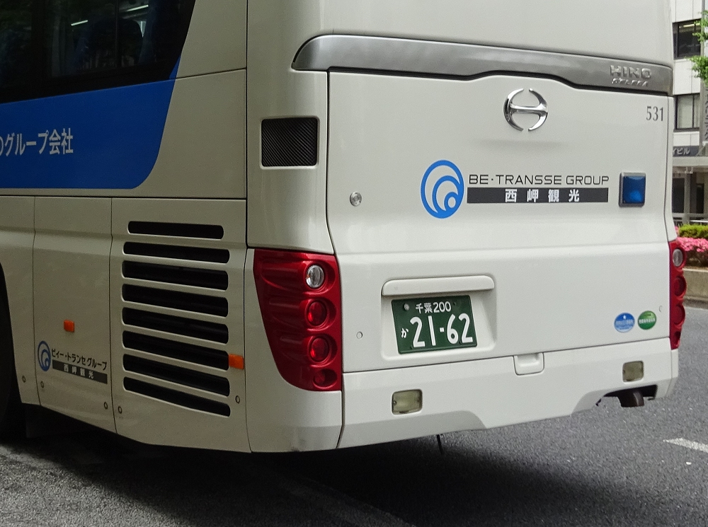 西岬観光バス